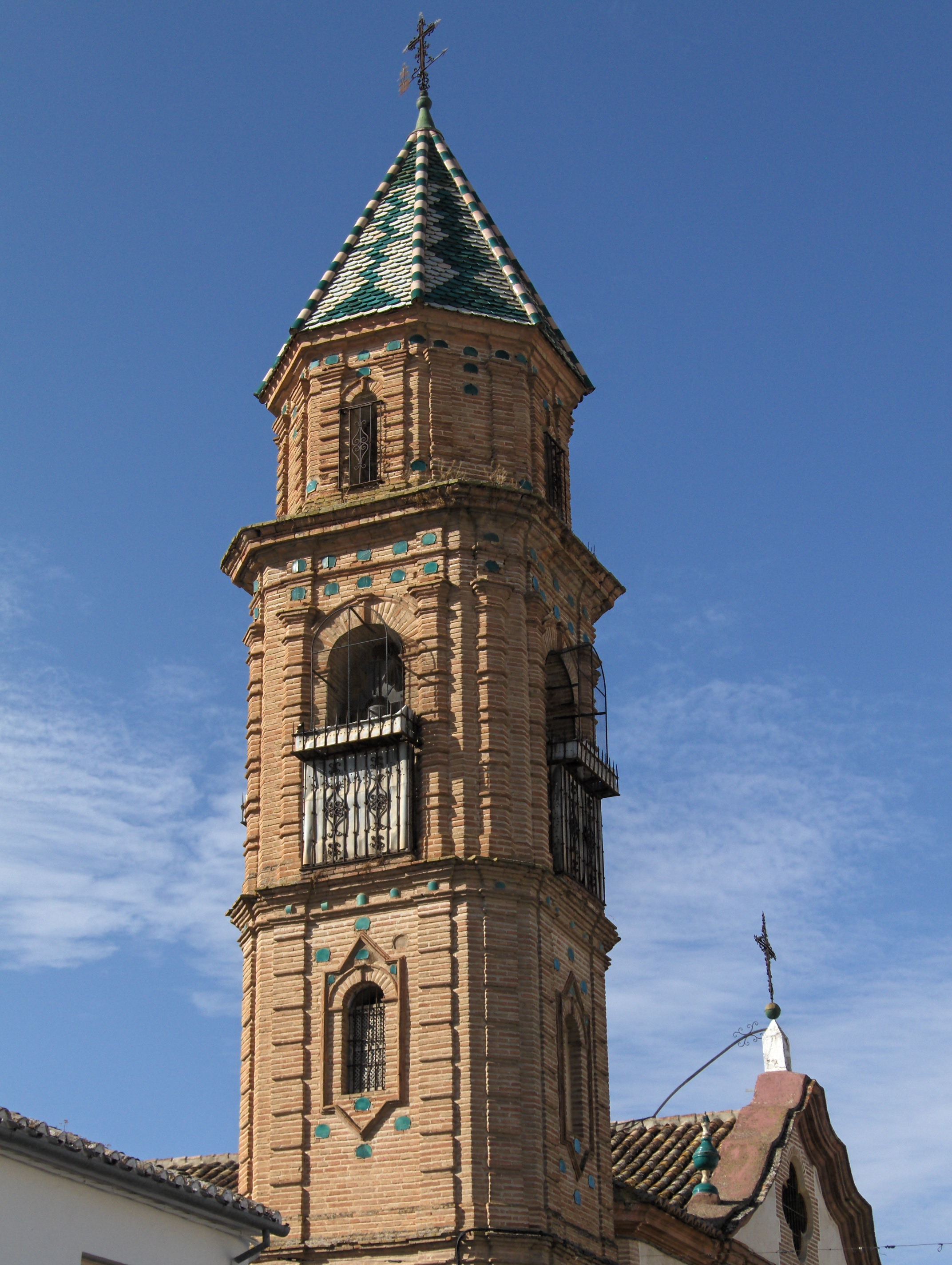 Torre del Convento de las Mínimas, Archidona, Málaga, España.